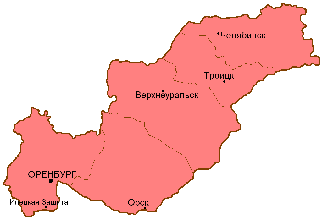 АТД Оренбургской губернии